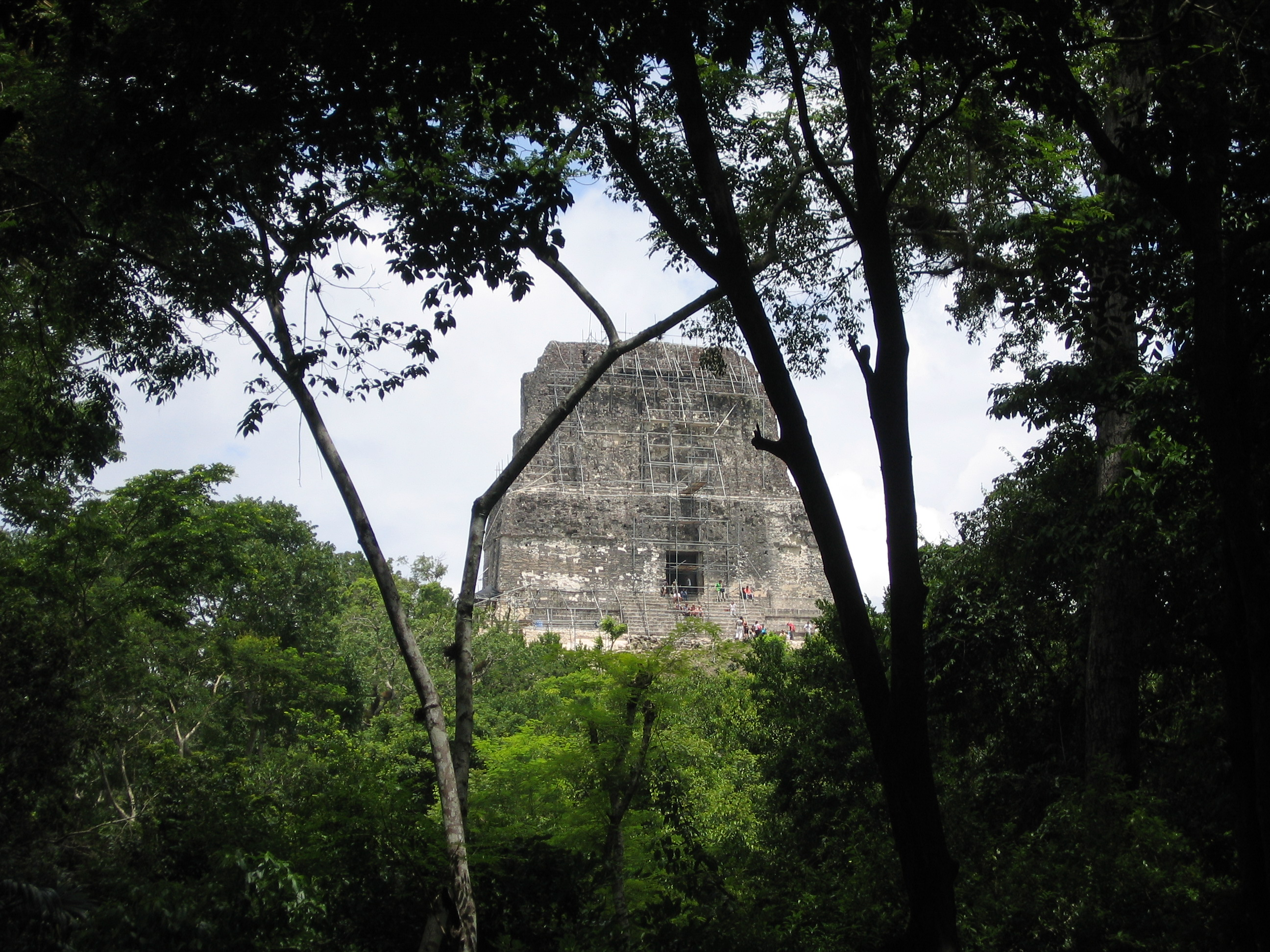 Tikal (Guatemala), temple 4, August 2006